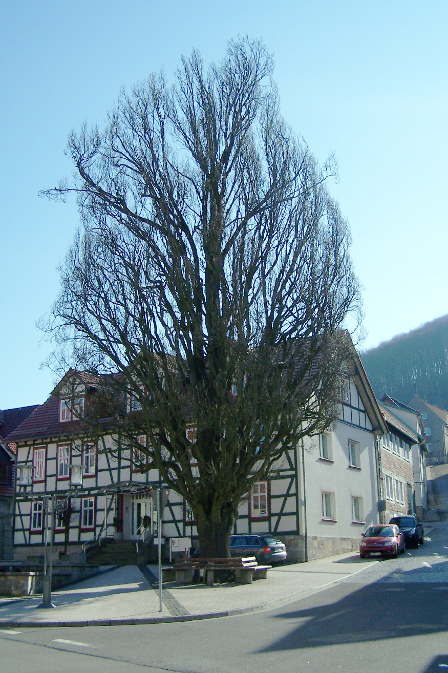 An der Gemeindeverwaltung Heyerode.